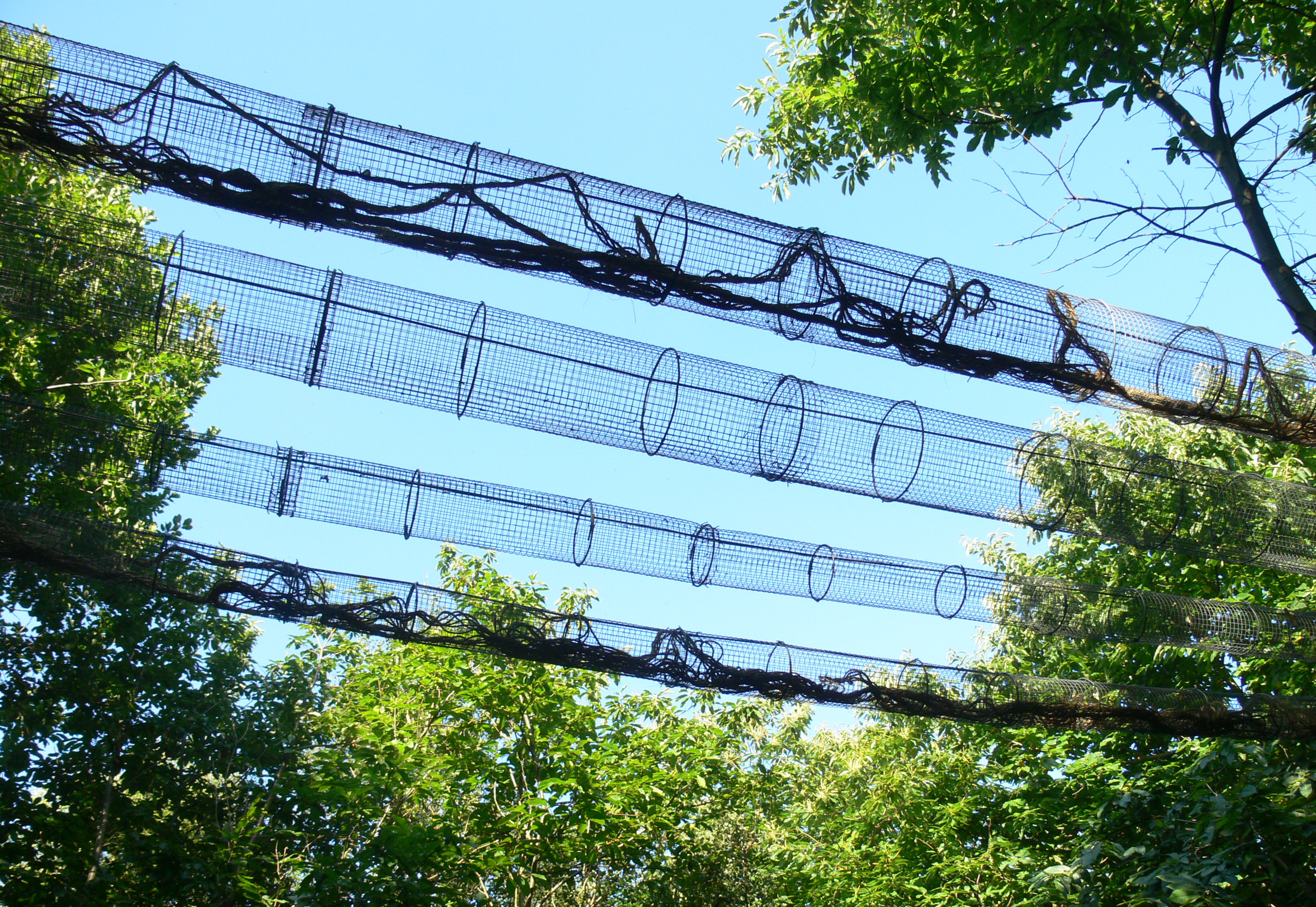 écoduc permettant à de petits mammifères de traverser une chemin, et de passer d'une cage à l'autre, dans le Parc de découverte de Wildwood, dans le Kent, qui traite du thème de la faune européenne actuelle ou récemment disparue en Angleterre